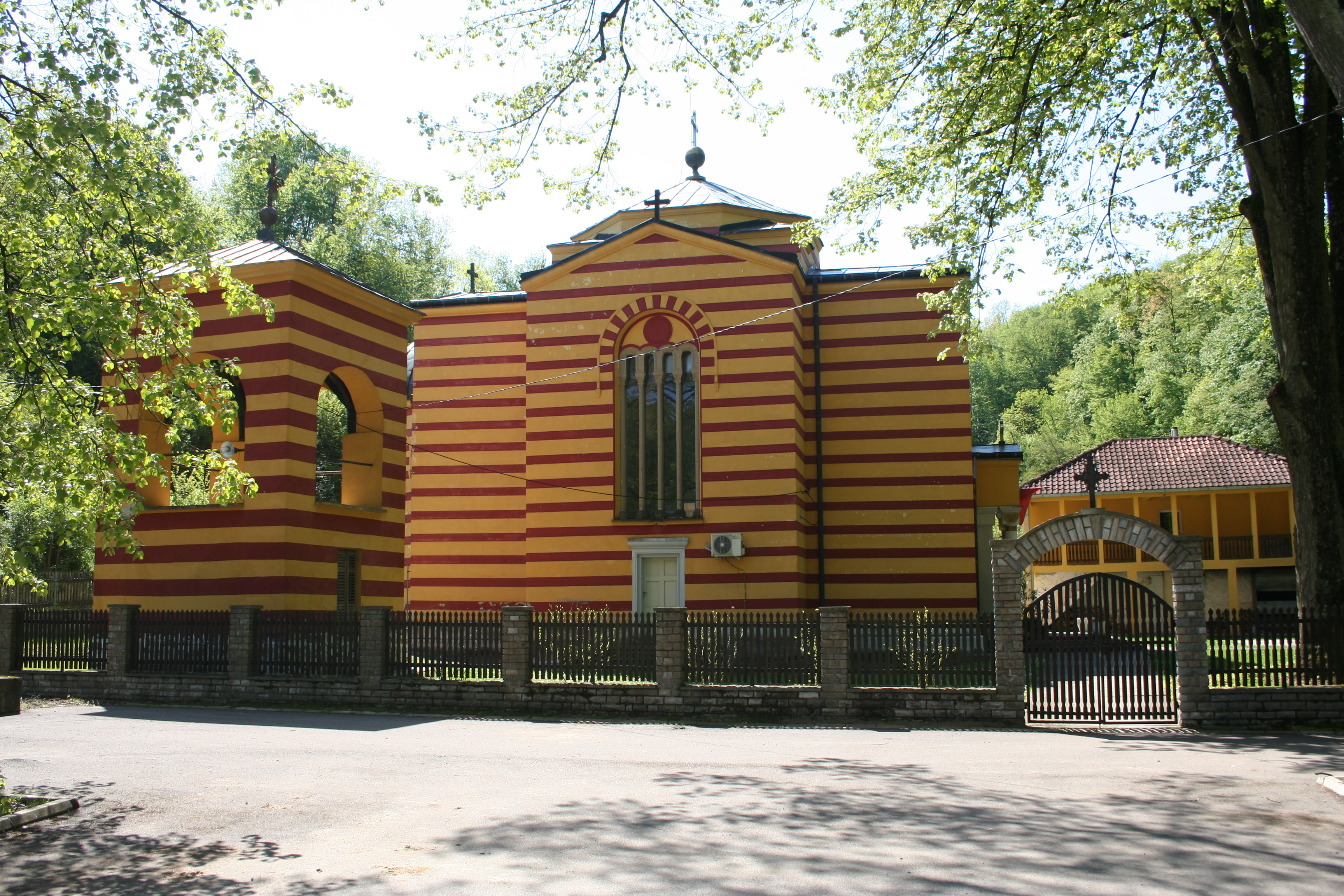 Manastir Ribnica, Paštrić